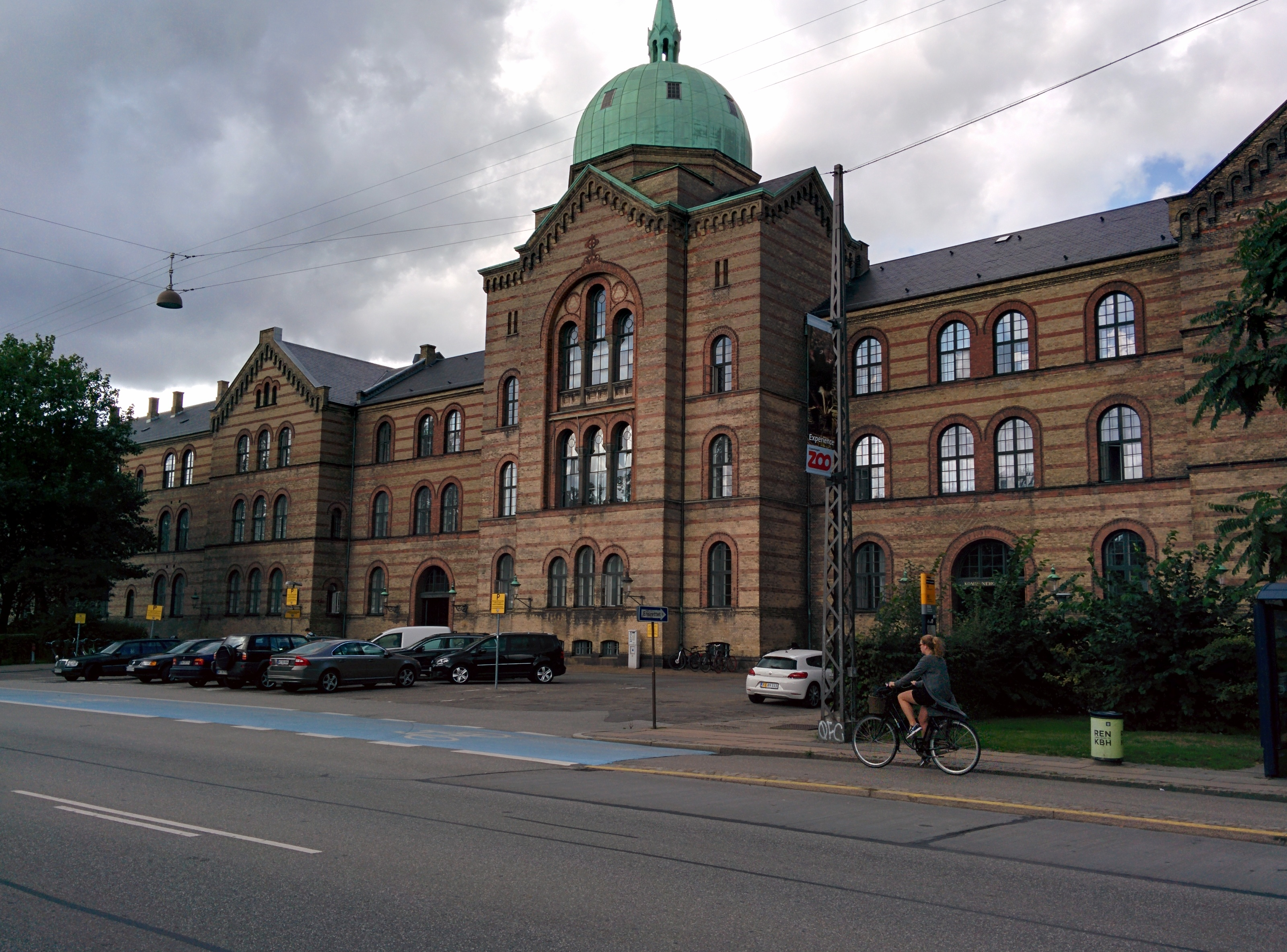 The former Københavns Kommunehospital in Copenhagen, Denmark